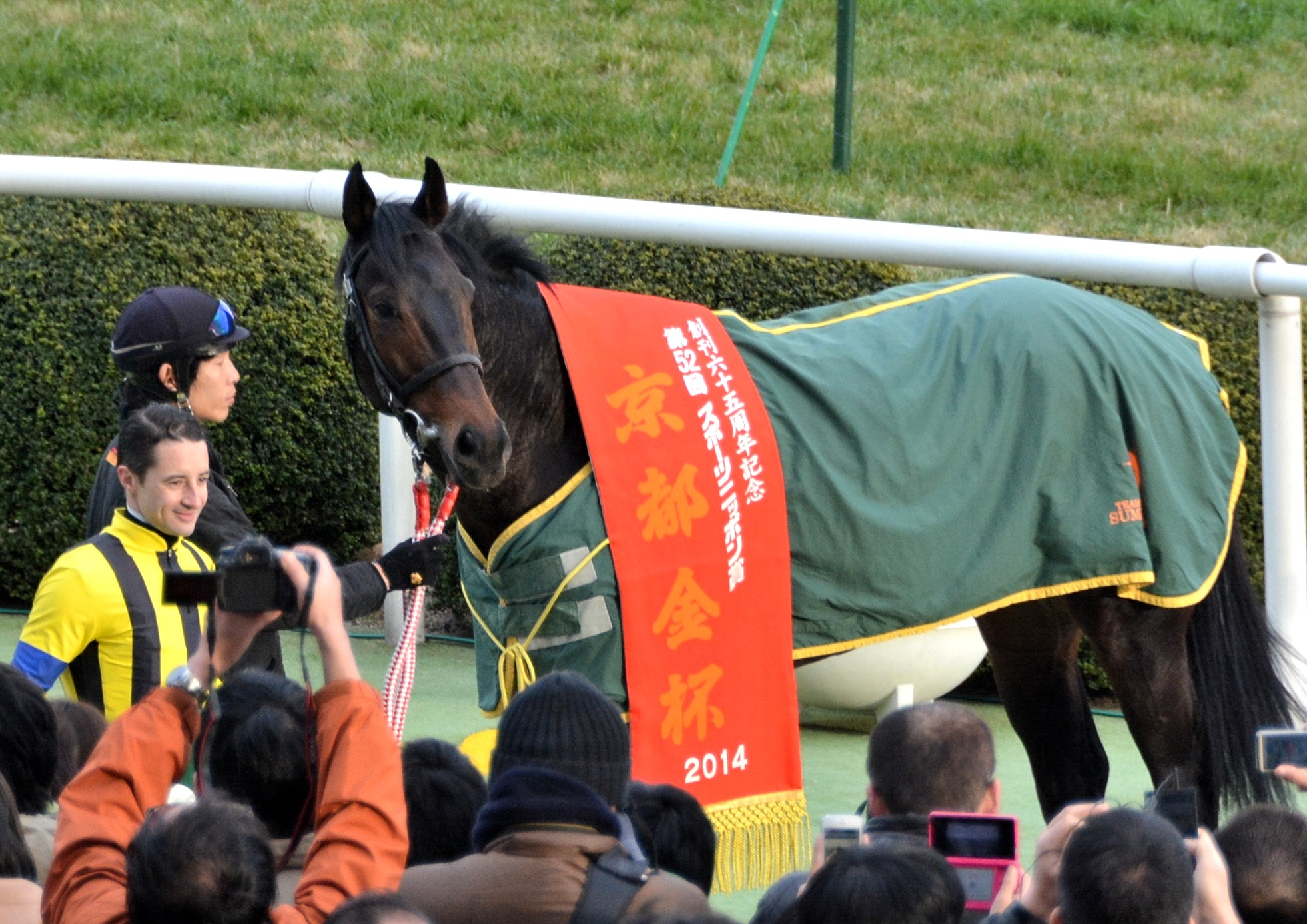 2014年1月5日に京都競馬場の第11競走で行われた、第52回スポーツニッポン賞京都金杯(GIII)の表彰式で、勝利馬のエキストラエンドとクリストフ・ルメール騎手を、観客席であるグランドスワンから撮影したもの。